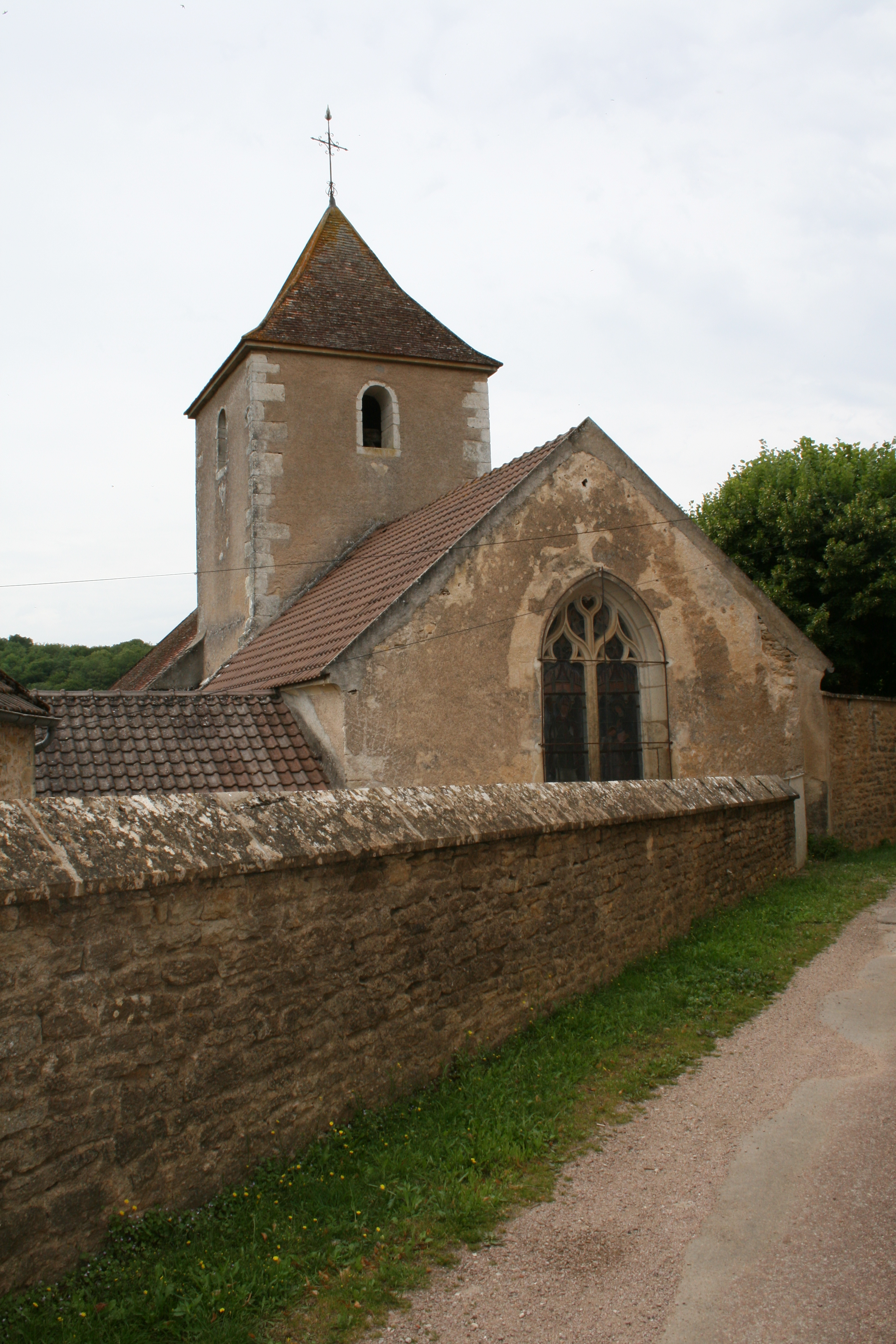 Marmeaux Eglise Saint-Michel